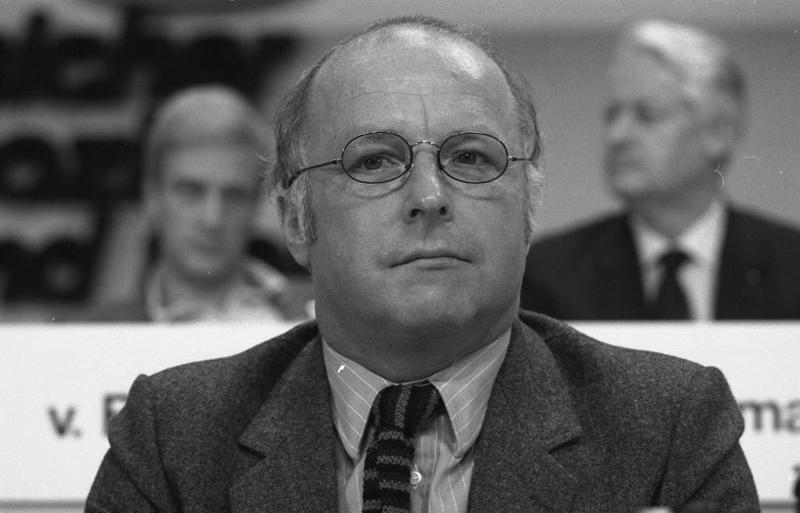 02.-05.11.1981 30. Bundesparteitag der CDU in Hamburg im Congress Centrum